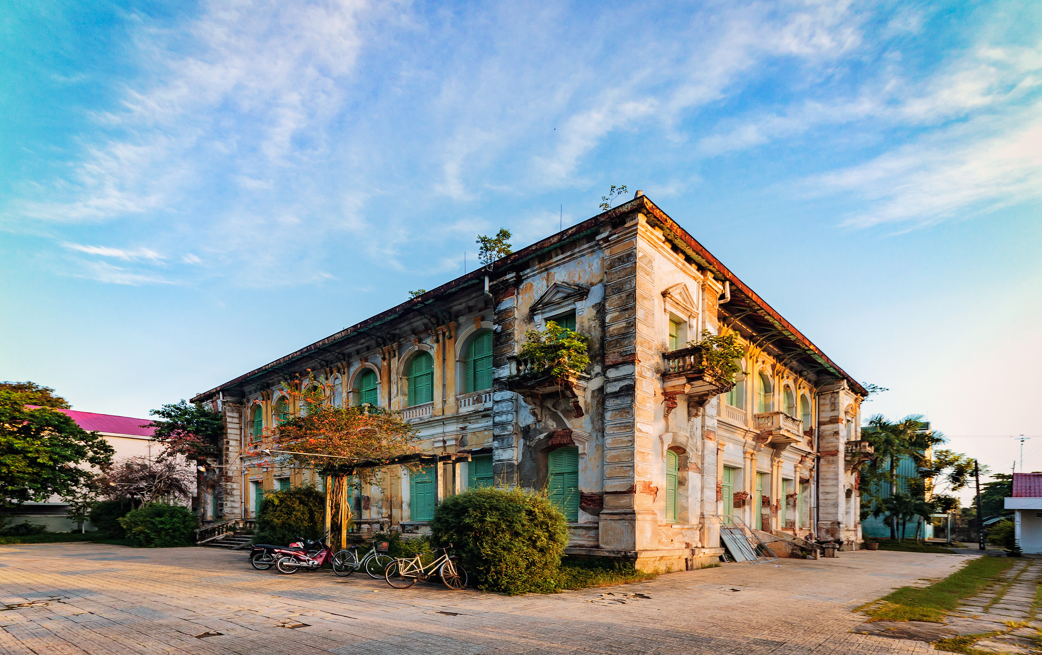 Di tích dinh Chánh Tham biện thời Pháp thuộc, sau đó là dinh Tỉnh trưởng ở thị xã Gò Công (Tiền Giang, Việt Nam).